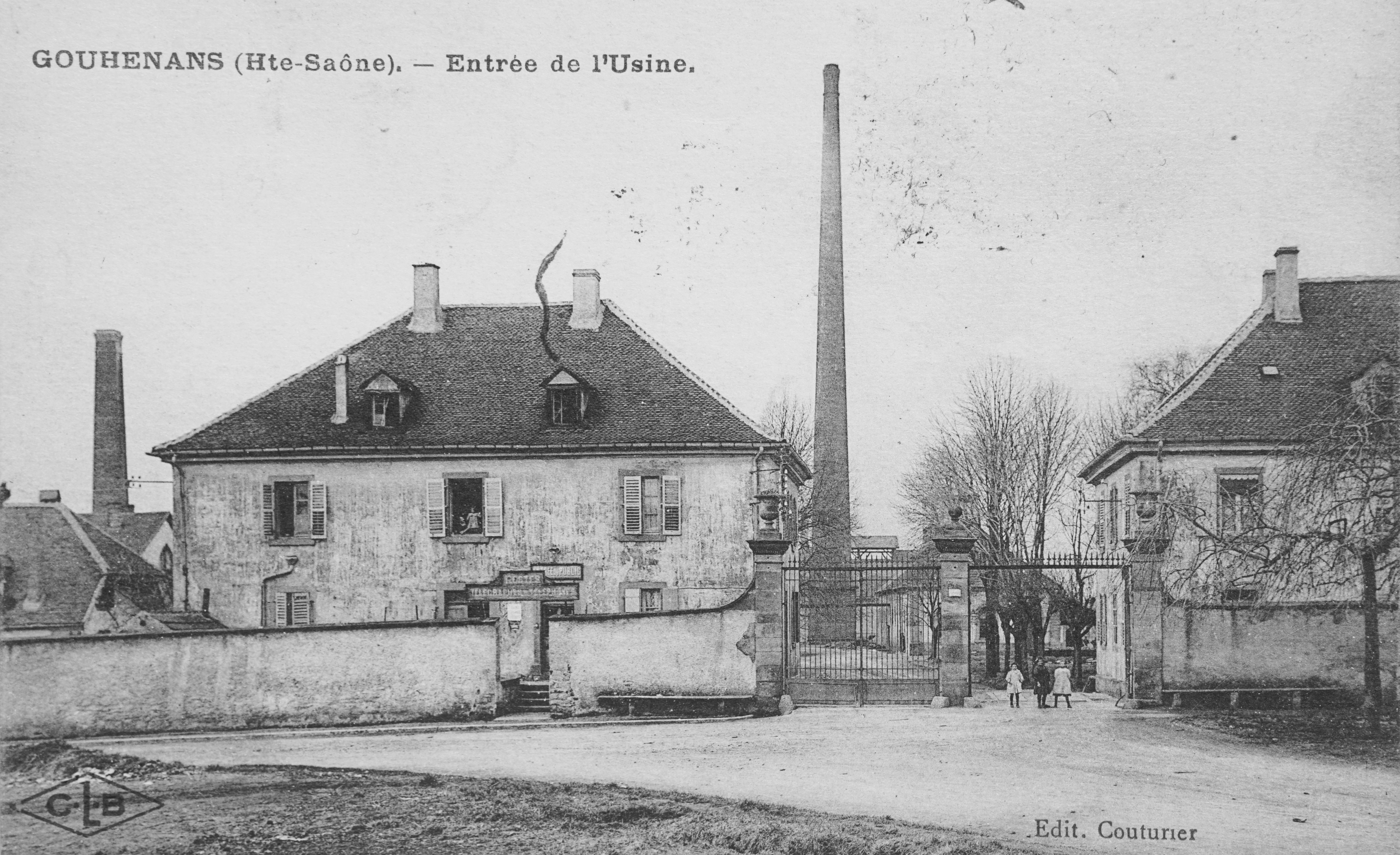 Gouhenans : Entrée de la saline et de l'suine chimique.